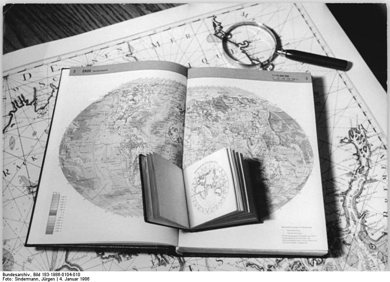 Rostock, UB, "Etui-Atlas der Erde" ADN-ZB Sindermann 4.1.86 Rostock: Atlanten verschiedenster Größe befinden sich im Besitz der 416 Jahre alten Rostocker Universitätsbibliothek. Das kleinste Exemplar, wahrscheinlich auch der kleinste Atlas der Welt, ist der "Etui-Atlas der Erde". Das Büchlein mit einem Format von 67 mal 68 Millimeter wurde 1831 in der Rostocker Steindruckerei Tiedemann hergestellt. Es enthält 26 sehr sorgfältig gestaltete, handkolorierte Abbildungen der Länder Europas sowie der Kontinente Afrika, Amerika, Asien und Australien. (siehe 11 und 9 N und ADN-Meldung)